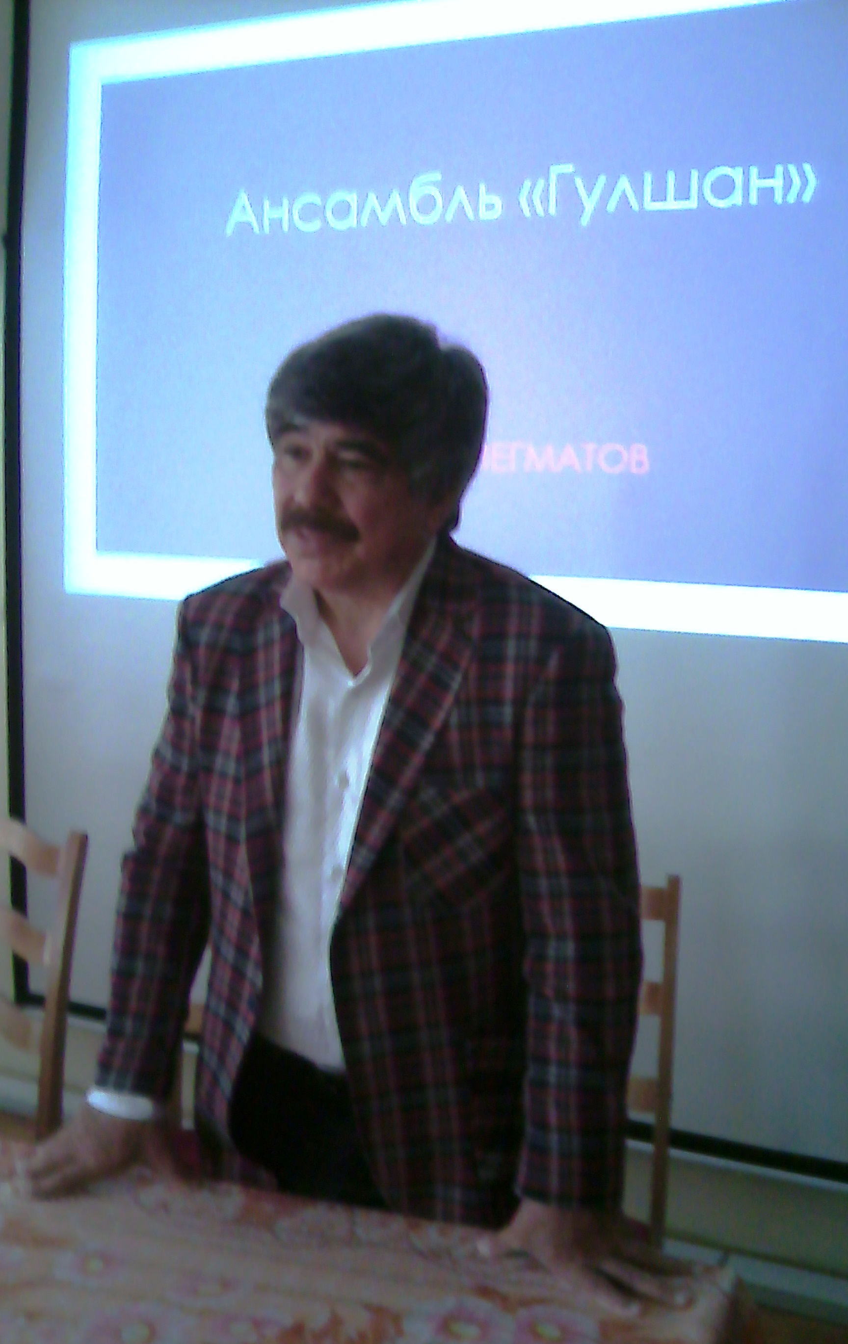 Тоҷикӣ: Баҳодур Неъматов, Ҳунарпешаи халқии Тоҷикистон, собиқ сароянда ва роҳбари ансамбли "Гулшан"